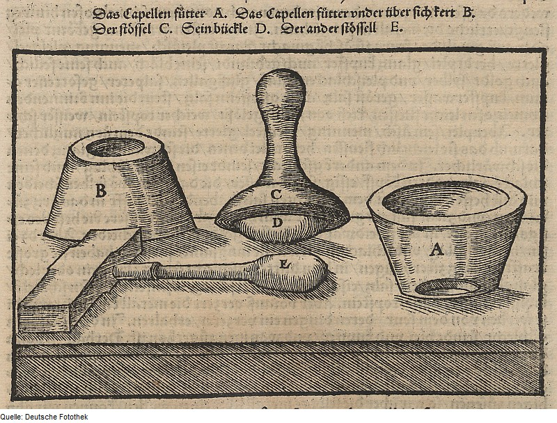 Original image description from the Deutsche Fotothek Bergwerk & Bergbau & Metallurgie & Kupelle & Pressform & Pistill & Stößel & Probierwesen